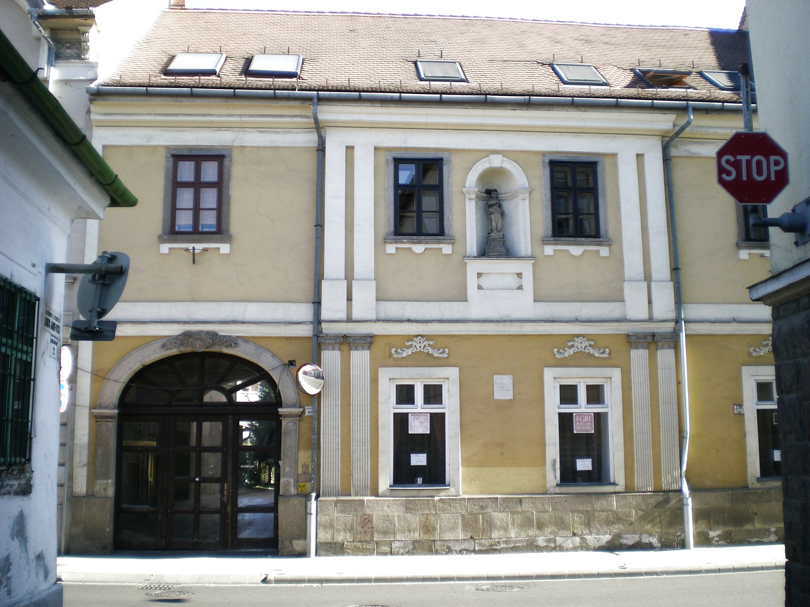 Végess-Rózsa-ház (Eger, Széchenyi István u.40.) This is a photo of a monument in Hungary. Identifier: 5586